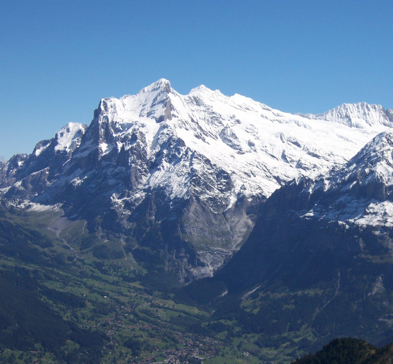 Wetterhorn (3692 m ü. NN) über Grindelwald eigene Aufnahme vom 31. August 2006